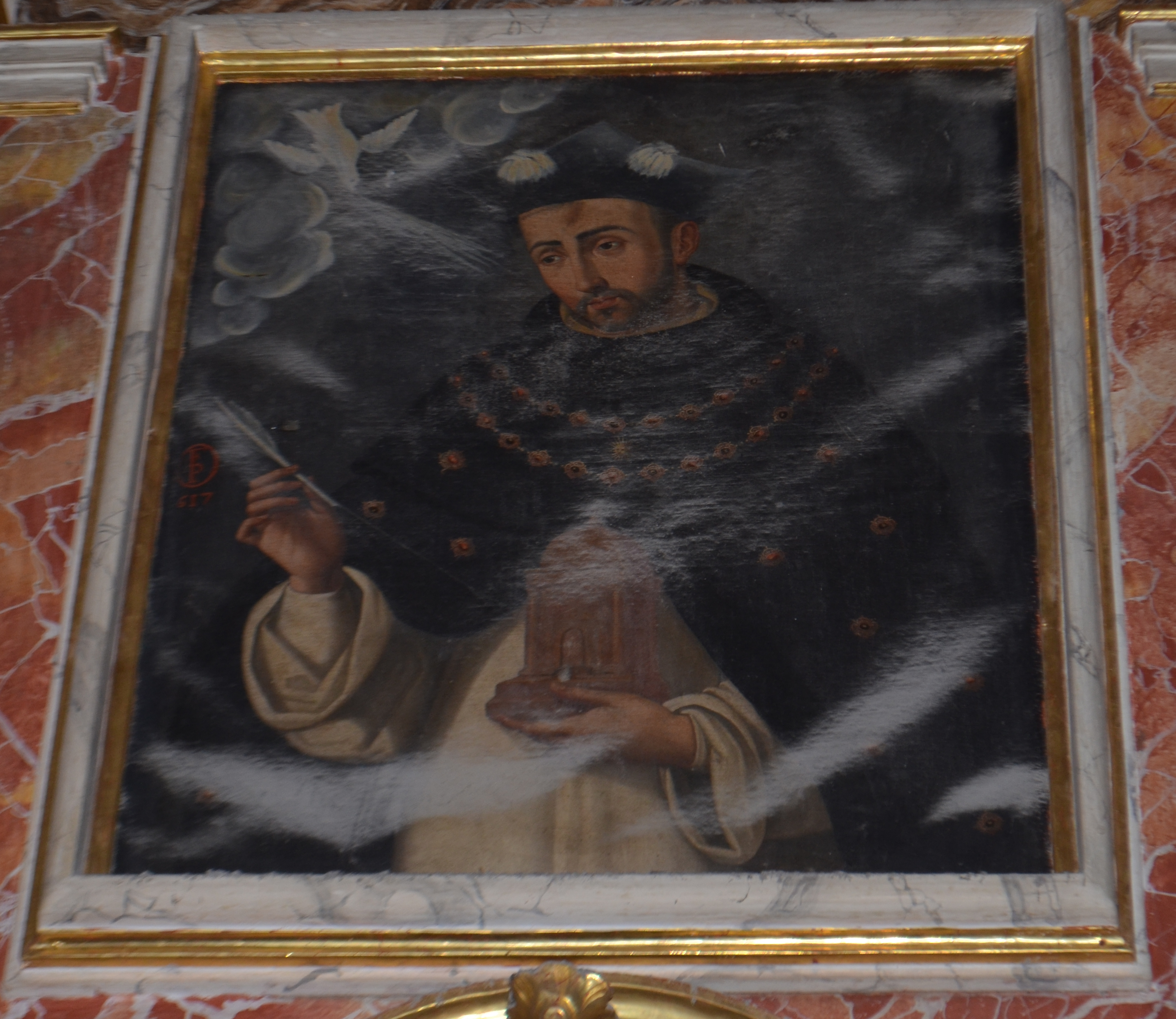 Francisco Pacheco, Santo Tomás de Aquino, Iglesia de Santo Domingo de Guzmán, Sanlúcar de Barrameda